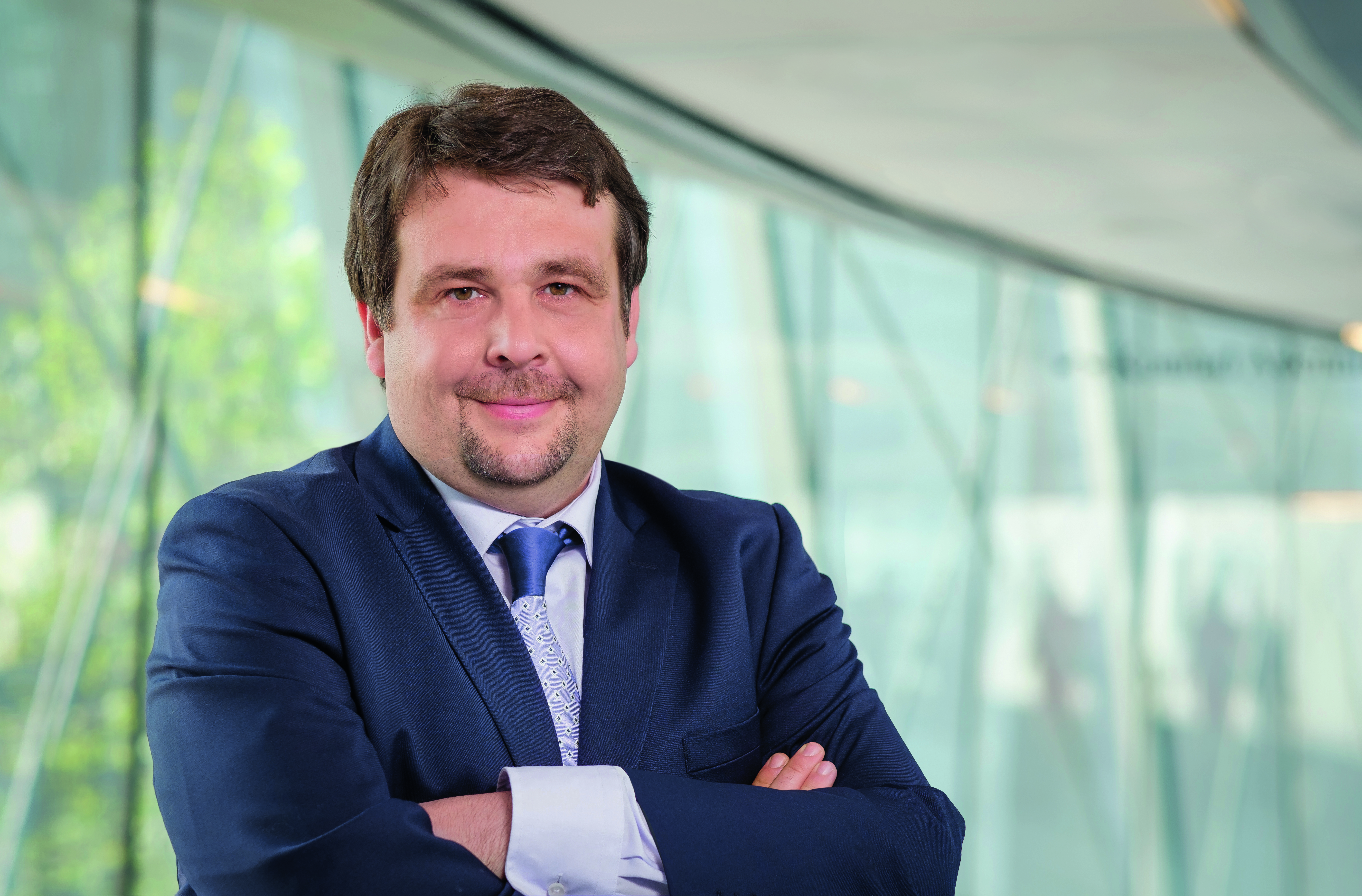 Dennis Radtke, MdEP